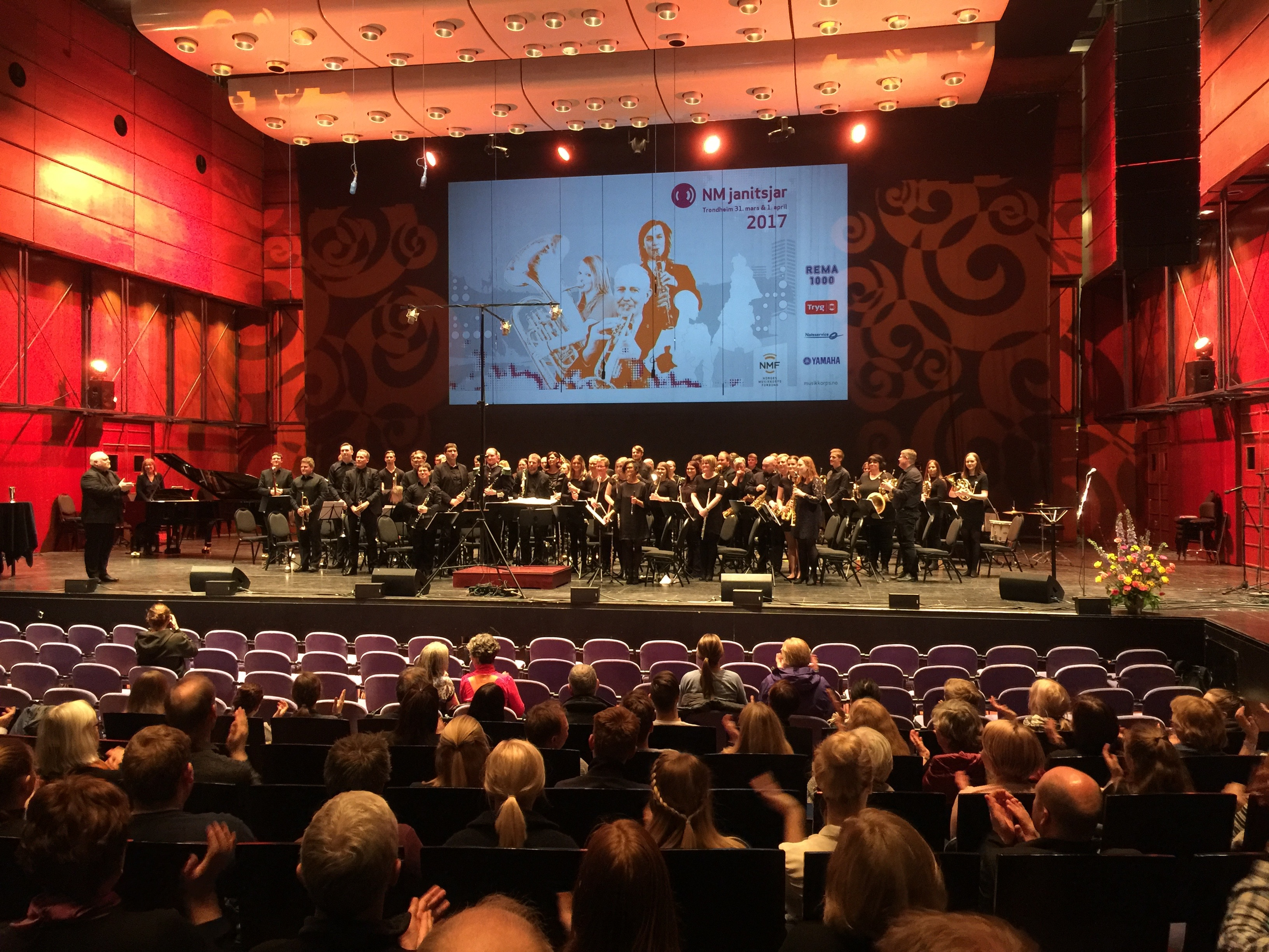 NM janitsjar 2017